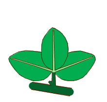 Morfología de la hoja. Tipo: ternadamente compuesta, palmada-ternada, con folíolos sésiles. Según Simpson (2005) Plant Systematics.